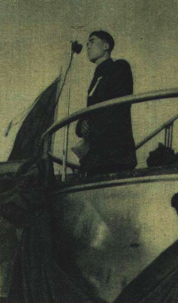 1951 中华全国学生联合会主席谢邦定在机场 国际学生联合会